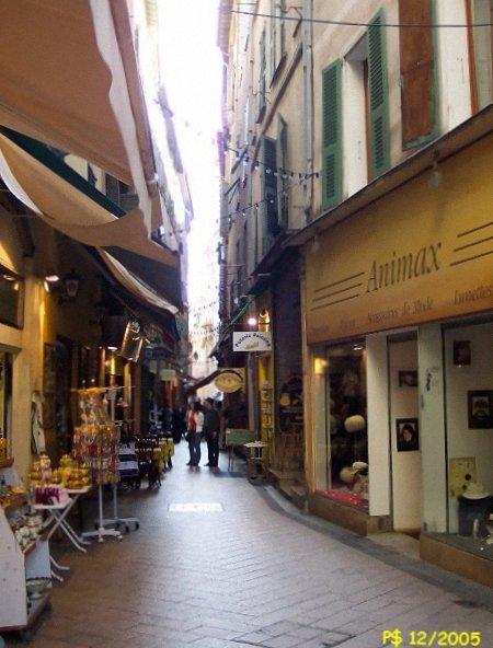 La début de la rue du pont-vieux vers la place Rossetti (vers le sud).